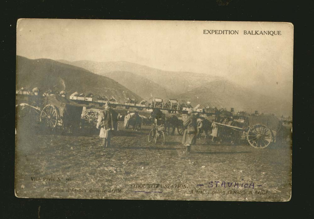 Съглашенски войски край Струмица през Първата световна война.